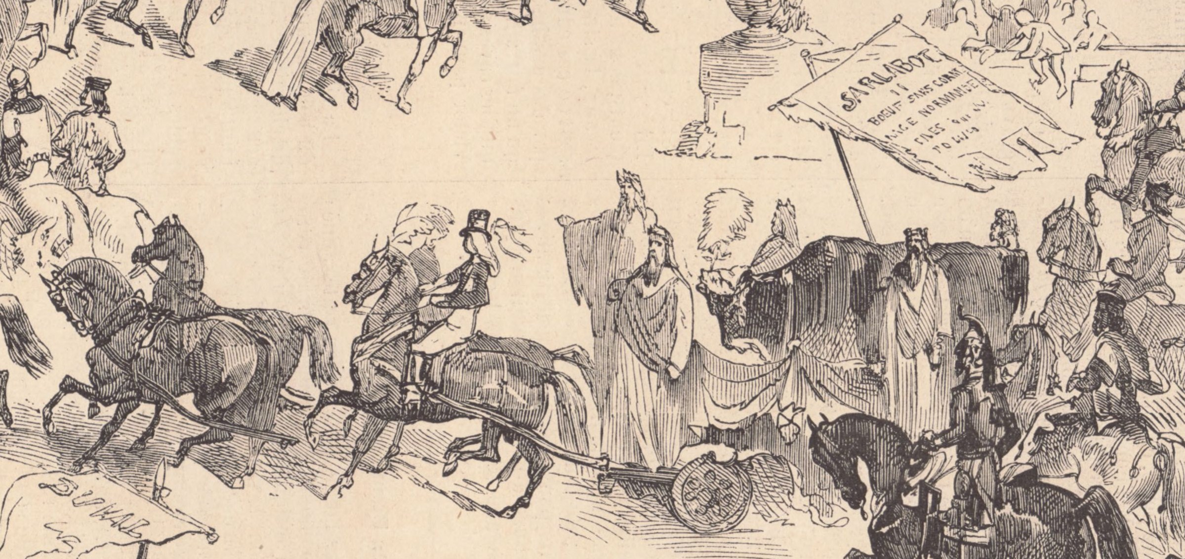 Le char du Bœuf Gras Sarlabot au défilé des Bœufs Gras 1858 à Paris. Détail d'un dessin pleine page figurant le cortège.